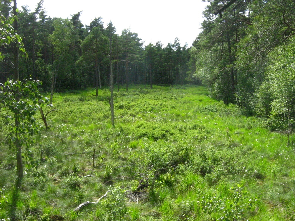 Das Dänschenburger Moor ist eines der größten Hochmoore Norddeutschlands. Durch Wasserabsenkung ist das Moor inzwischen fast vollständig mit Kiefern und Birken bewaldet. (NSG „Großes Moor bei Dänschenburg“ N21, 71 ha, Gemeindegebiet der Stadt Marlow, Landkreis Nordvorpommern, Mecklenburg) - Google Maps - Google Earth